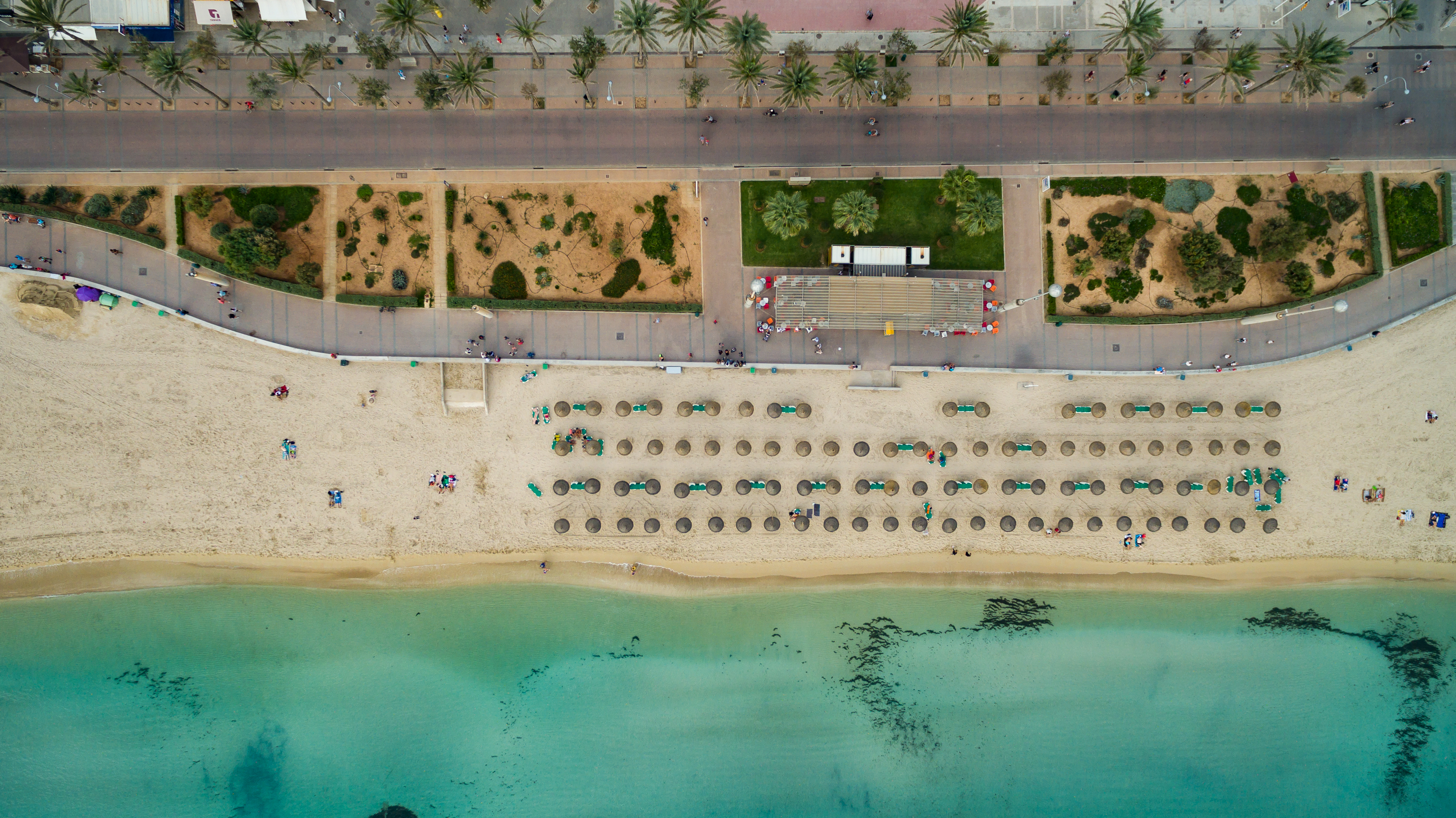 Mallorca Ballermann Balneario